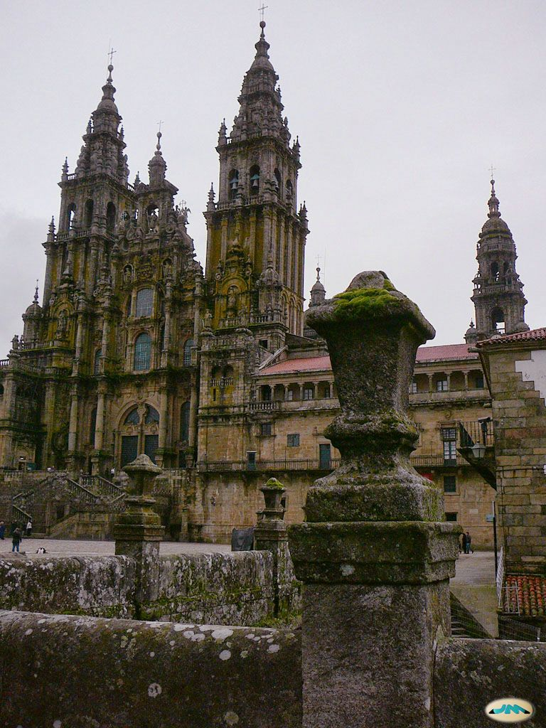 Catedral de Santiago de Compostela. Fachada do Obradoiro